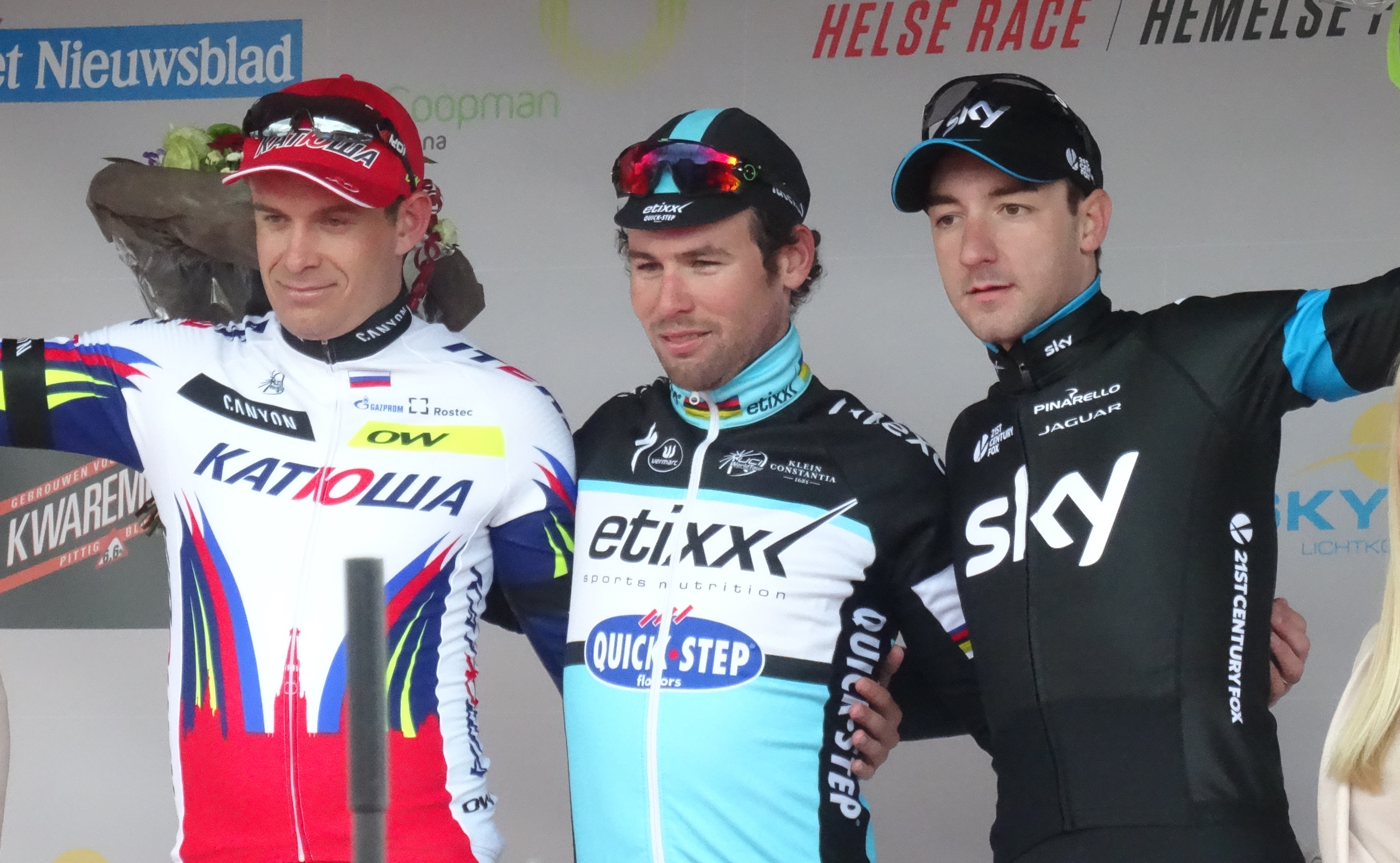 Reportage réalisé le dimanche 1er mars à l'occasion du départ et de l'arrivée de Kuurne-Bruxelles-Kuurne 2015 à Kuurne, Belgique.